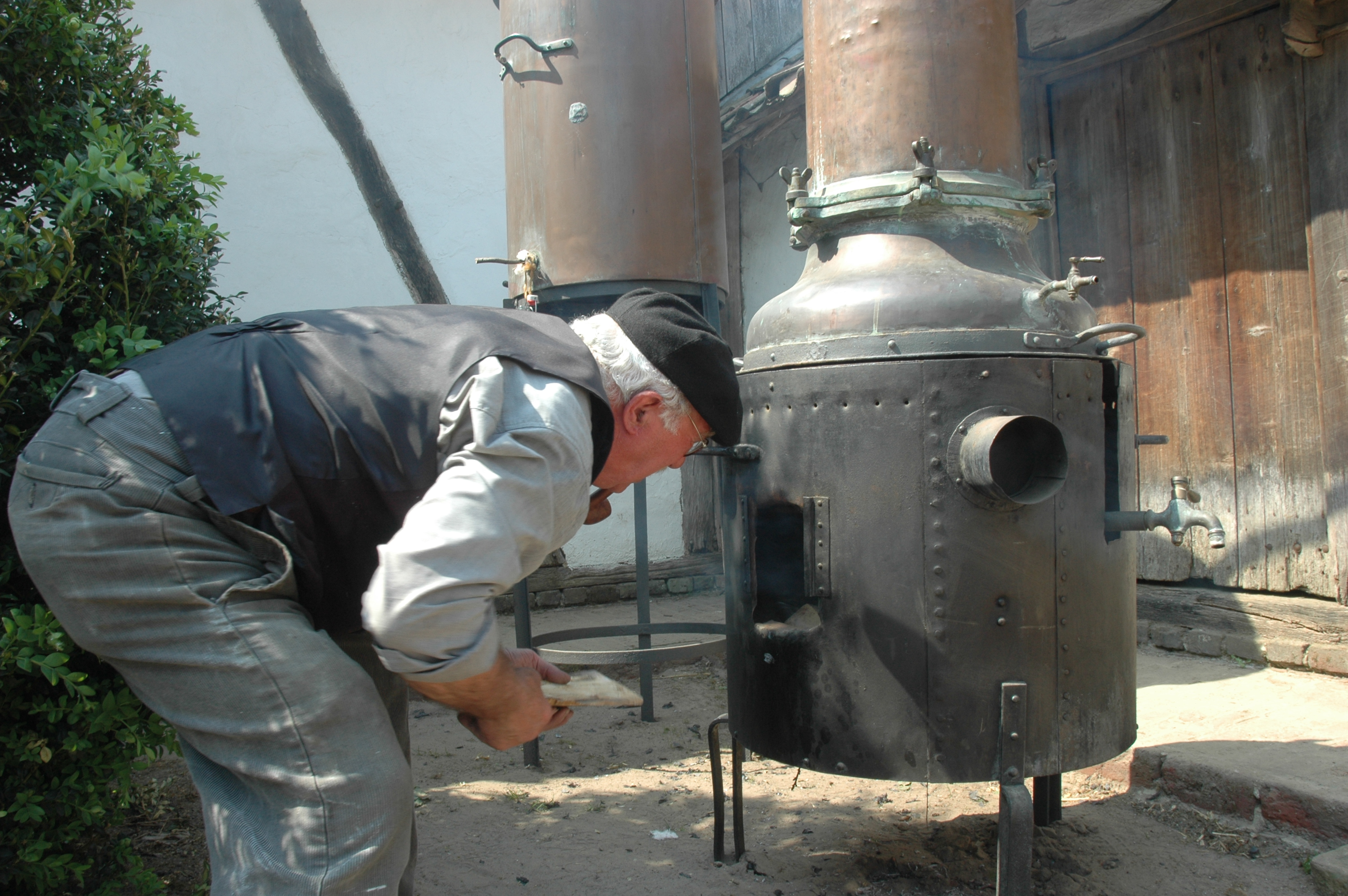 Bokrijk, Openluchtmuseum Bokrijk, verlevendiging, jeneverstoken, authentieke destilleerkuip Vlaams-Brabant, 1930